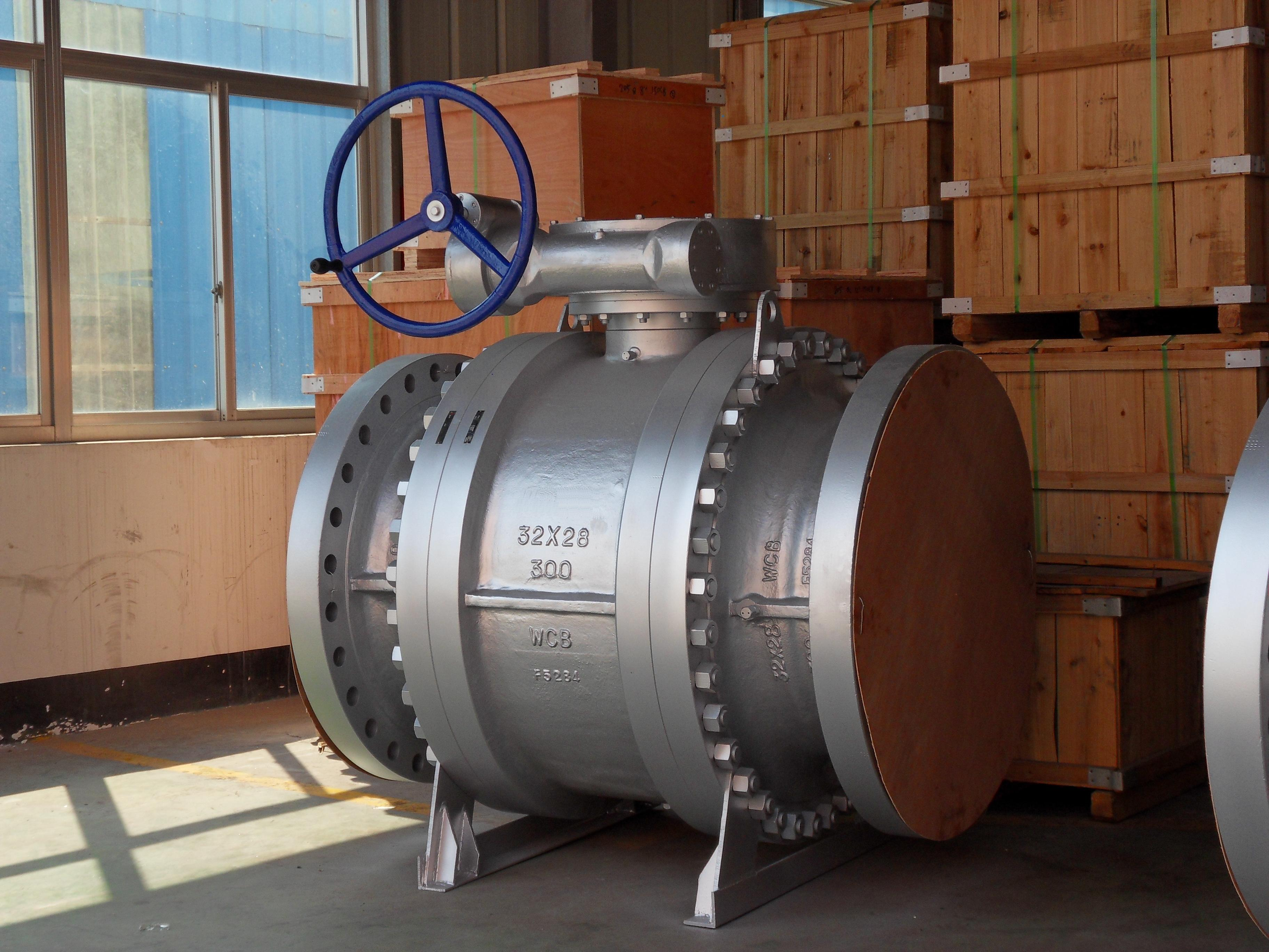 Ball valves.